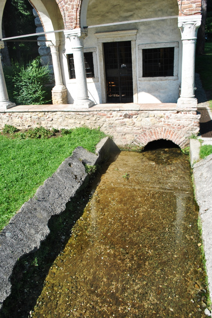 Oratorio di Santa Maria in Valle (Madonna della Salute) This is a photo of a monument which is part of cultural heritage of Italy.